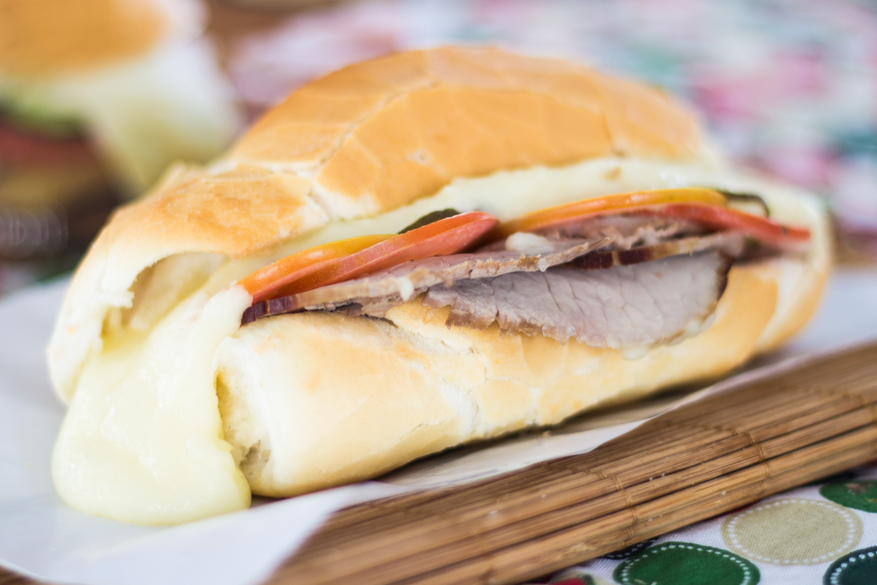 [2014-11-22] Empório Teodora - Bauru - Lanche Bauru_Romerito Pontes-2